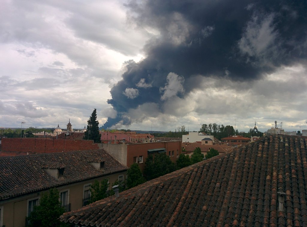 Nube de humo del incendio de Seseña en mayo de 2016 vista desde el centro de Aranjuez (Madrid, España).